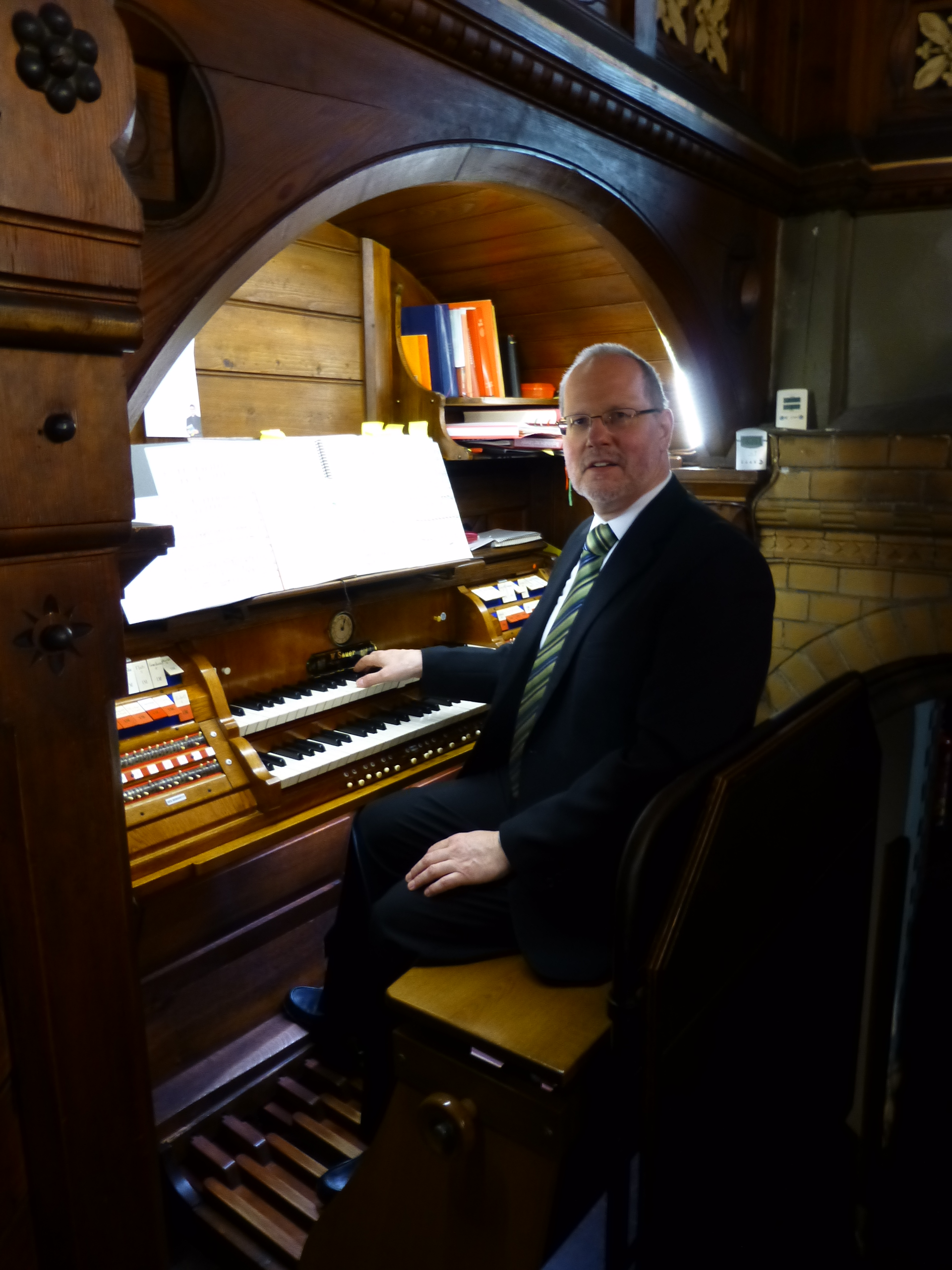 Thorsten Pech, an der Sauer-Orgel in der Friedhofskirche (Wuppertal-Elberfeld)